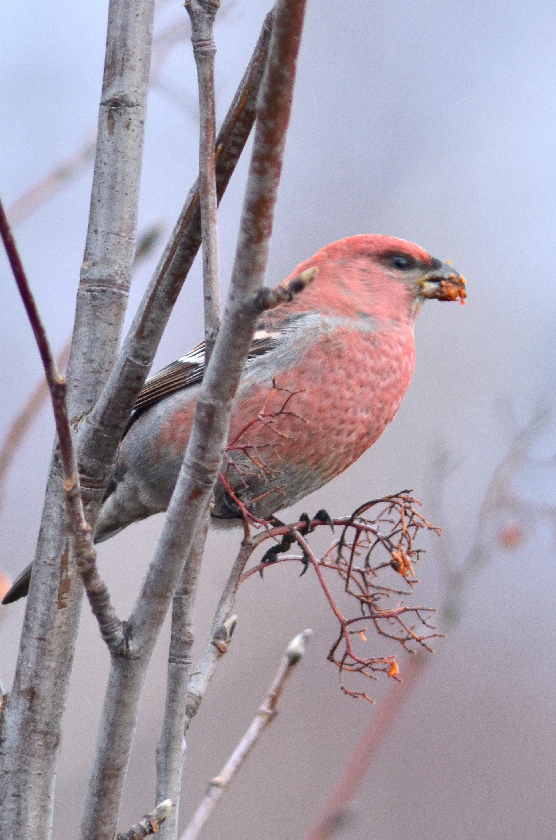 Pinicola enucleator, adult male, Kotka, Finland